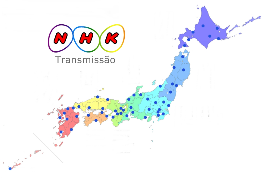 Estúdios e Afiliadas da NHK